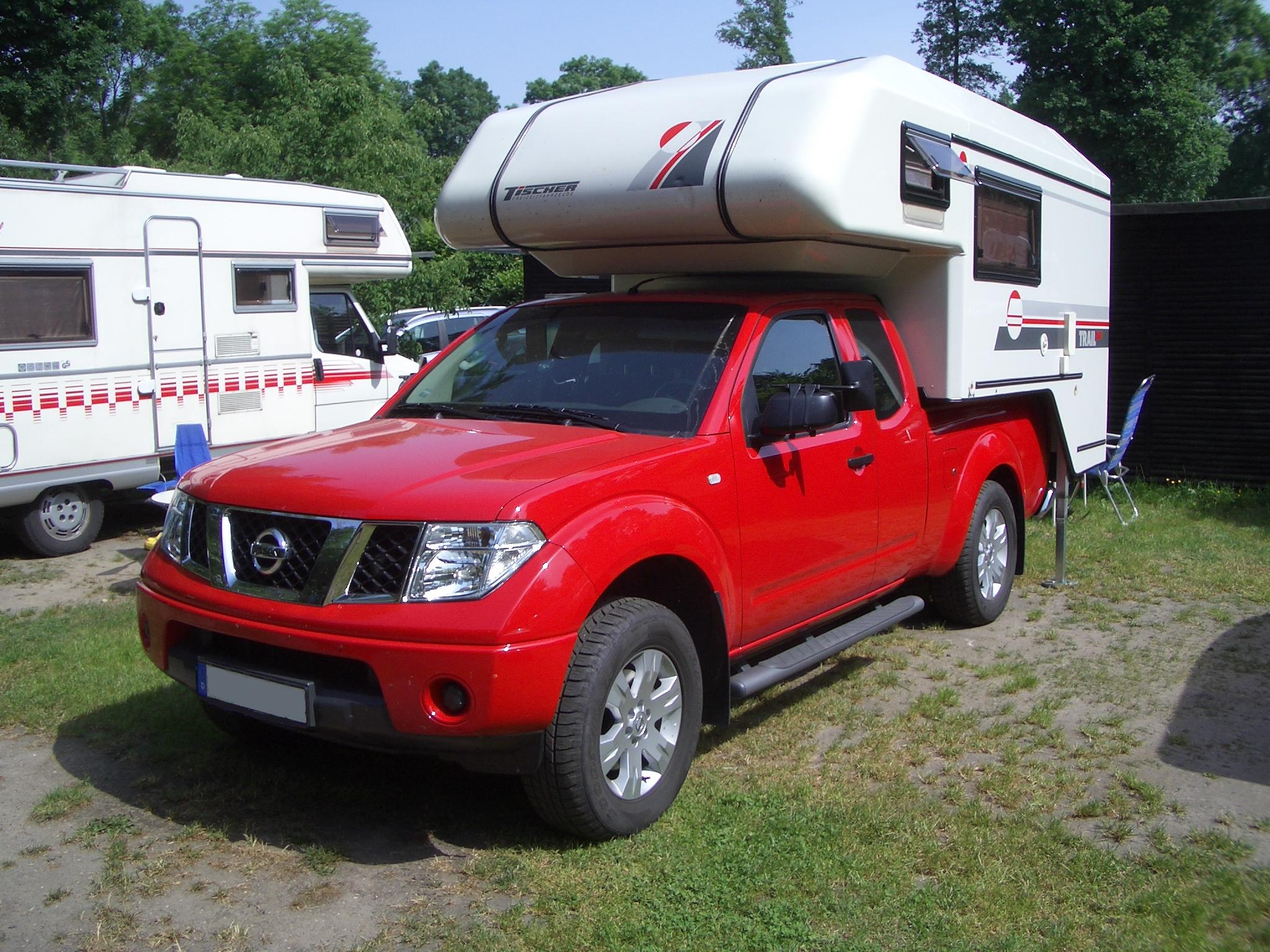 Wohnkabine auf Nissan Pickup (aktuelle Bauweise)